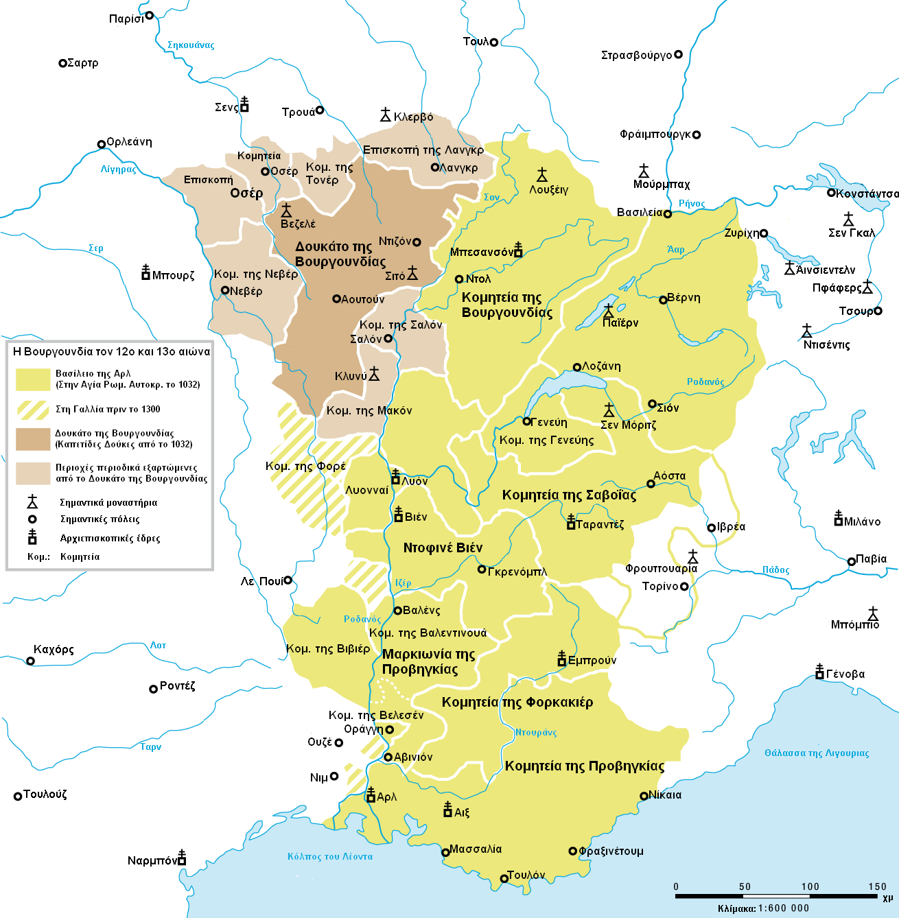 Η Βουργουνδία τον 12ο και 13ο αιώνα